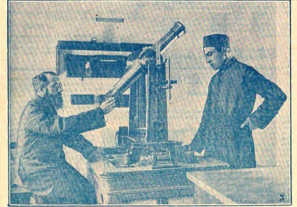 Matériel de l'observatoire des jésuites de Zikawei en 1927.